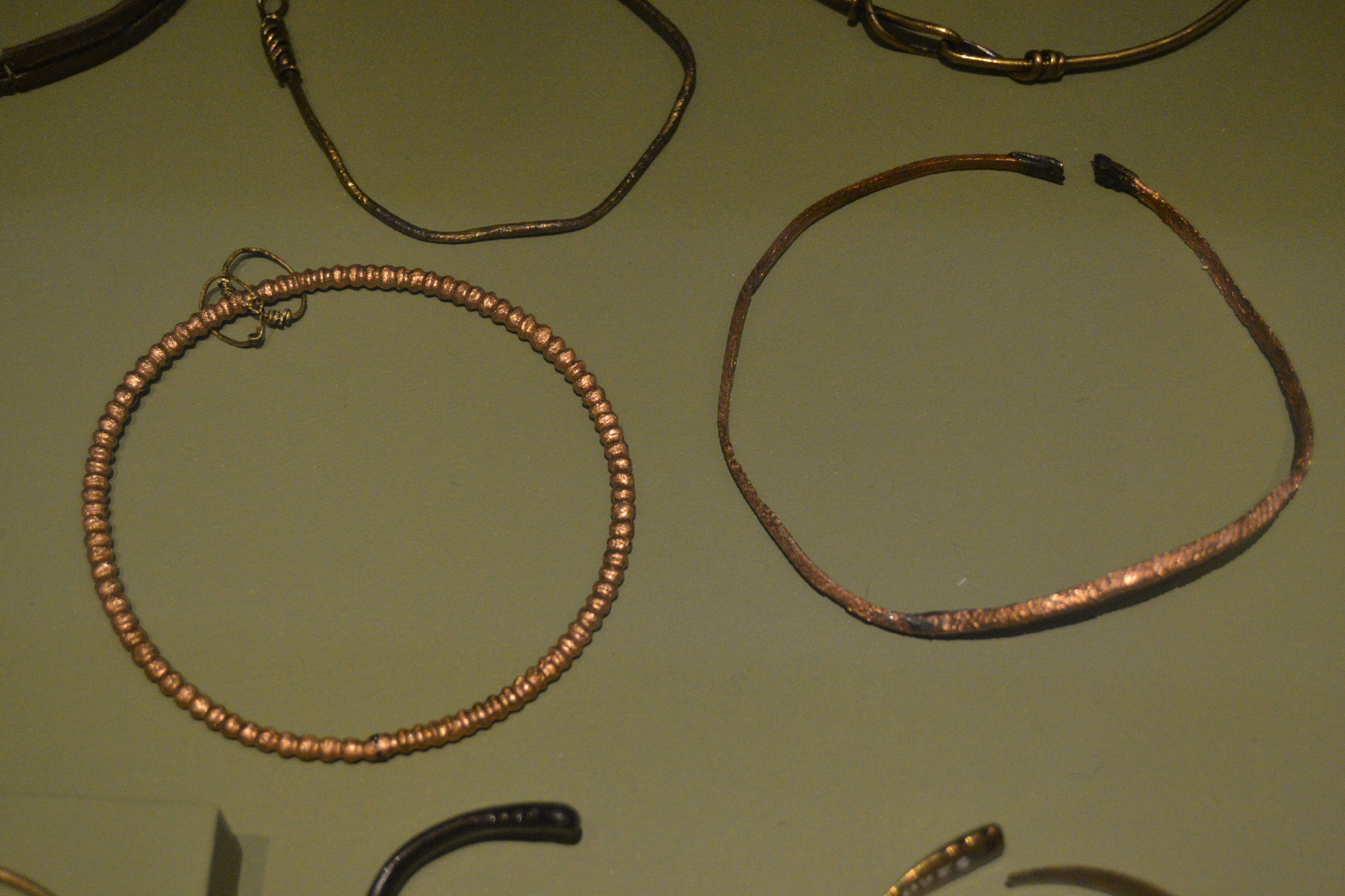 Kobber smykker fundet ved Hadrians mur